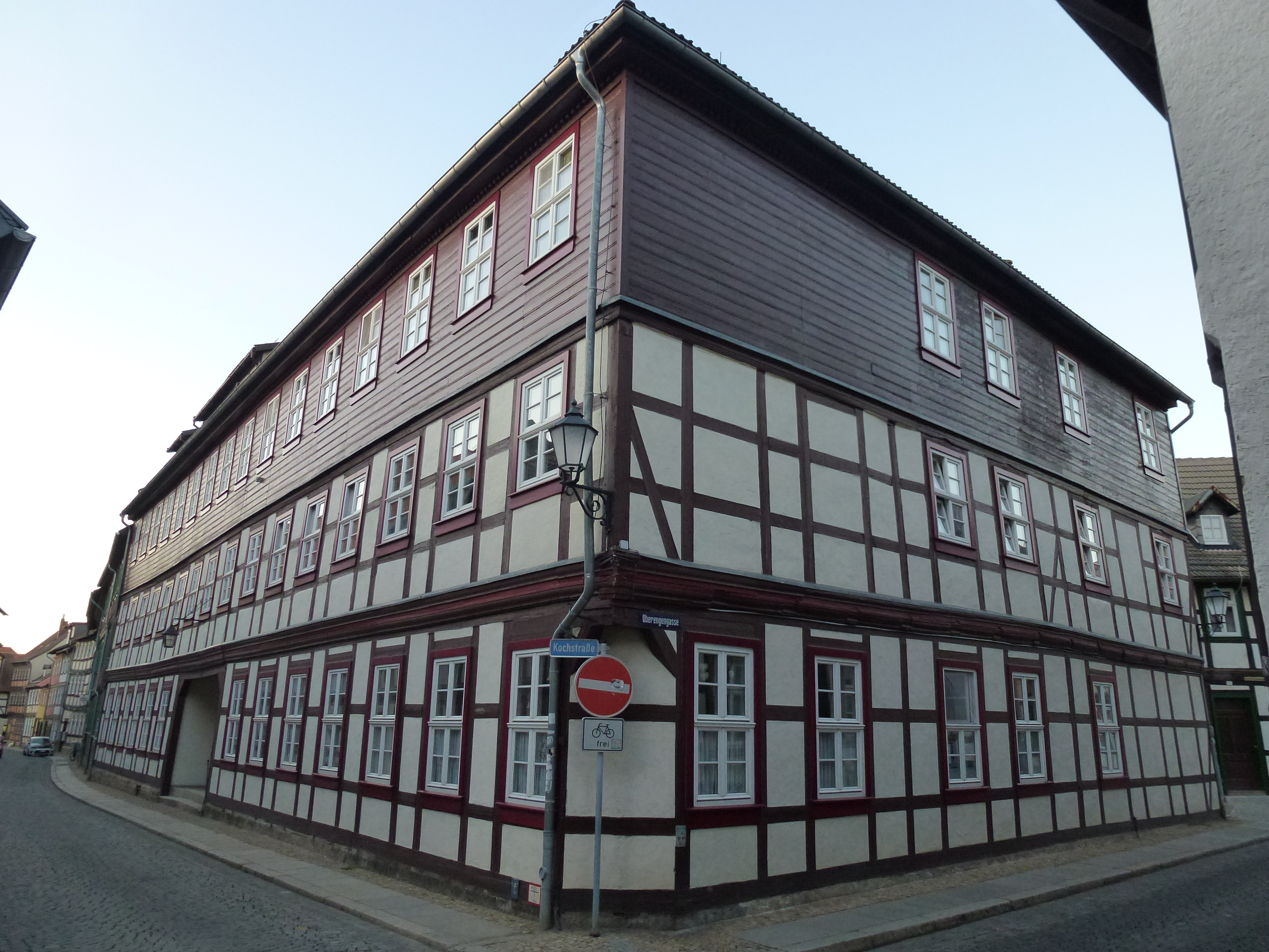 Nach dem Stadtbrand von 1751 wurde 1762 ein neues Brauhaus in der Kochstraße errichtet. Nachdem die Stadt das Haus 1844 kaufte, wurde 1847 eine Volksschule eingerichtet. Bis 1981 diente das Haus als Berufsschule, danach als Bürogebäude und heute als Wohnhaus.